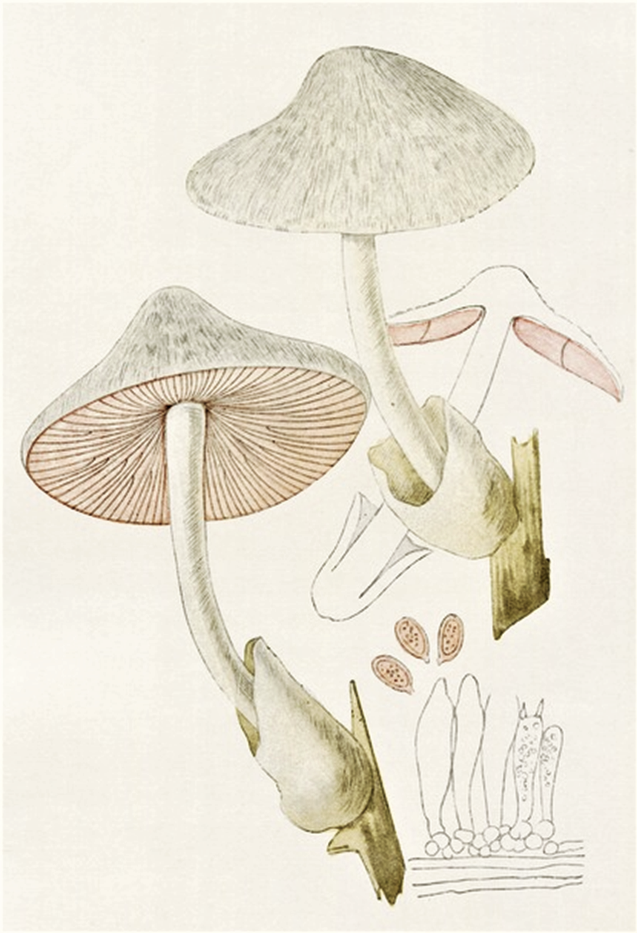 Giacomo Bresadola: Volvaria bombycina (Schaeff., 1774) P.Kumm. (1871), heute: Volvariella bombycina (Schaeff.) Singer (1951)